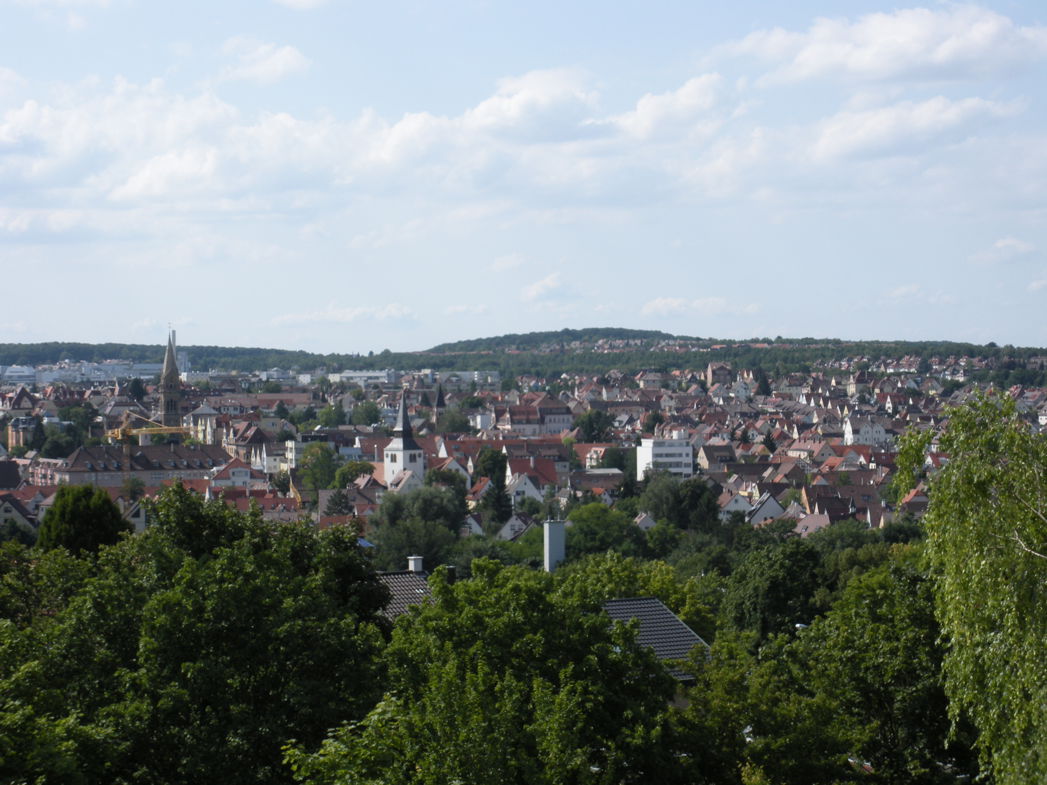 Blick über den Kernbereich (City) des Stadtbezirks Zuffenhausen in Stuttgart mit den Türmen der Evang. Paulus- und Johanneskirche